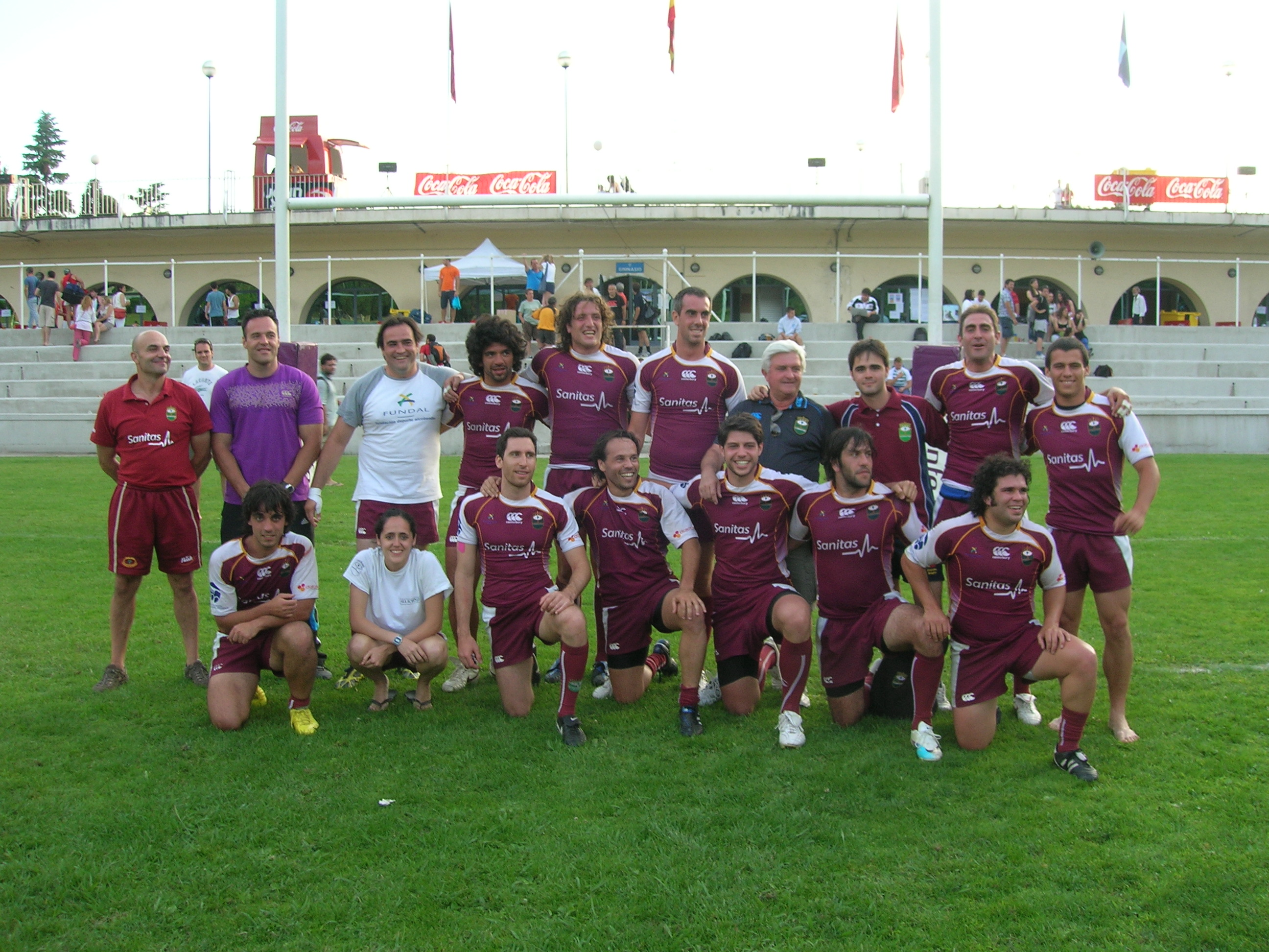 Formación de Alcobendas Rugby. Rugby a siete